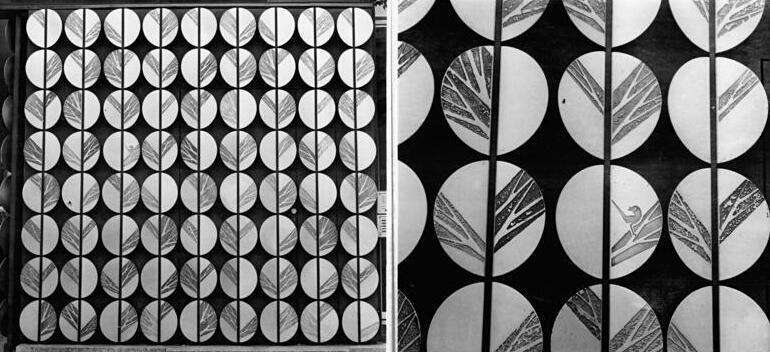 Berlin, Polnische Botschaft, Fassade Zentralbild Pech-25.7.69 Berlin: 244 Blätter aus Stahl schmücken den Eingang zur Botschaft der Volksrepublik Polen in der DDR. Prof. [Fritz] Kühn setzte in seinem Grünauer Atelier für Kunstschmiedearbeiten diesem Schmuckrelief einen Lichtpunkt auf. Auf einem Lindenblatt hat sich Unter den Linden in Berlin ein kleiner Vogel (rechtes Foto) niedergelassen.